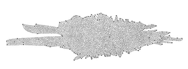 Représentation de la Voie Lactée selon Caroline Herschel. A noter qu'elle s'était trompée puisqu'elle avait placé le soleil au centre de notre galaxie.